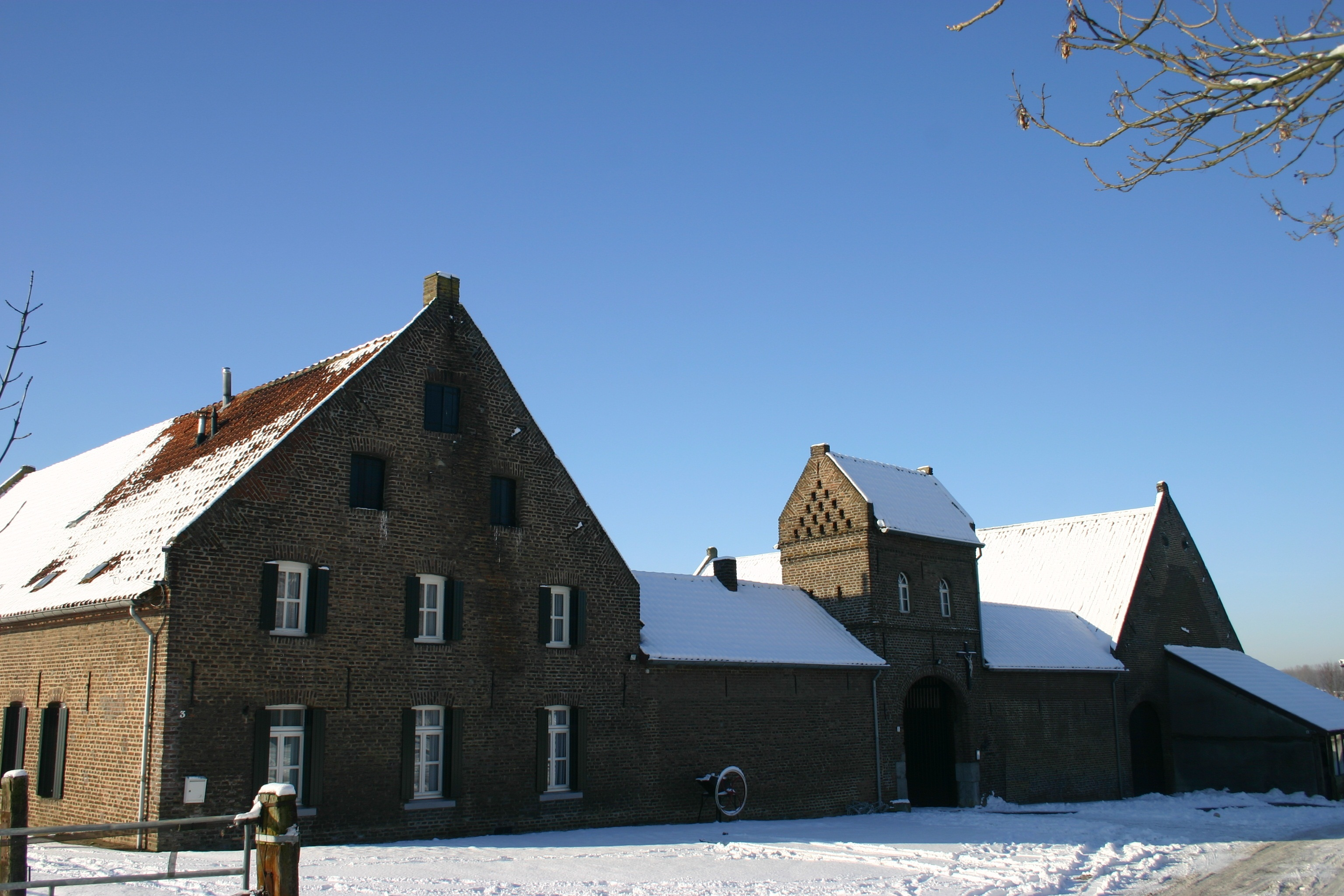 Tonnedenhof, Gesloten boerenhoeve, XVII-XVIII. Woonhuis en schuur elk met zadeldak tussen topgevels met vlechtingen. Ingangsvleugel met hoger poortpaviljoen onder een zadeldak tussen zijtopgevels met duivengaten.